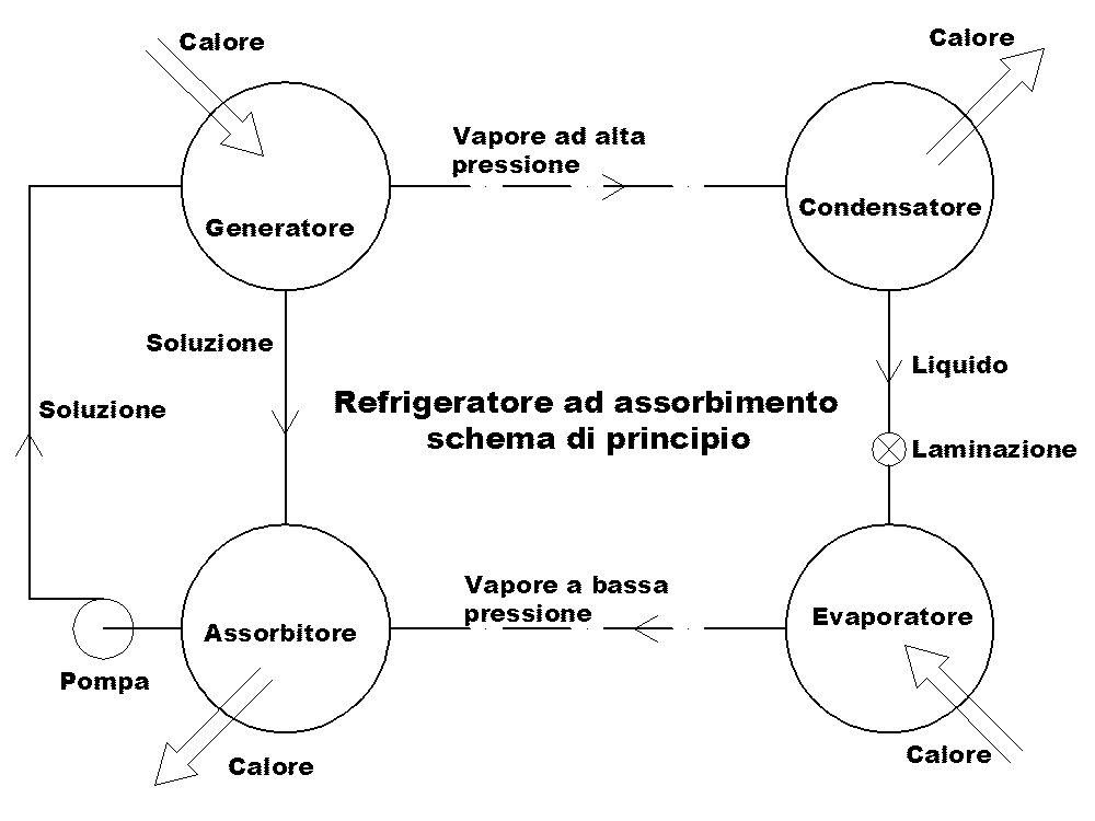 Schema di principio del processo di refrigerazione ad assorbimento